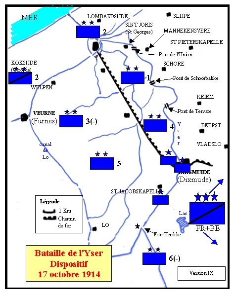 bataille de l'Yser 17 octobre 1914 dispositif armée belge